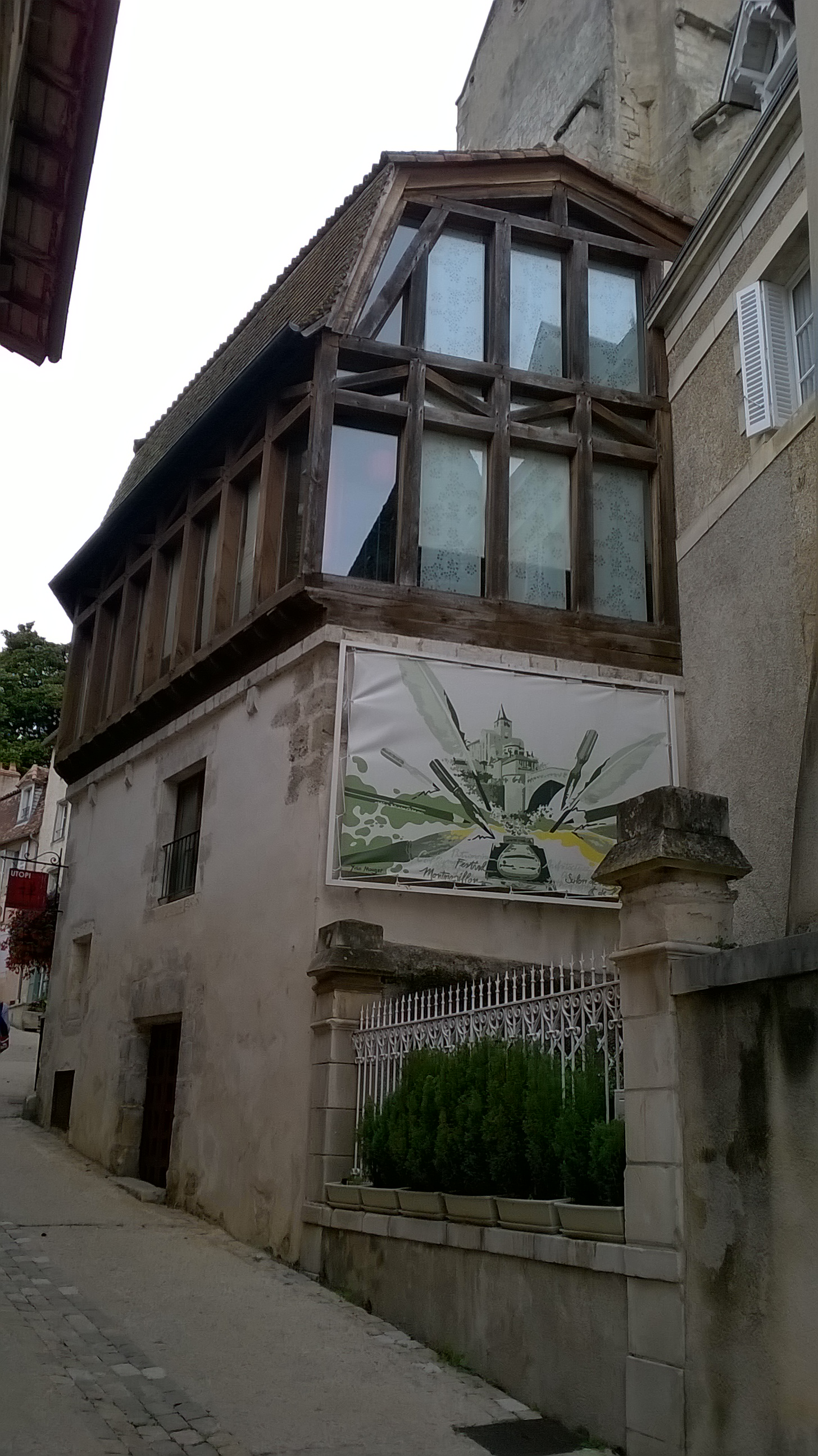 House of Brouard at 6 rue de Montebello, Montmorillon .